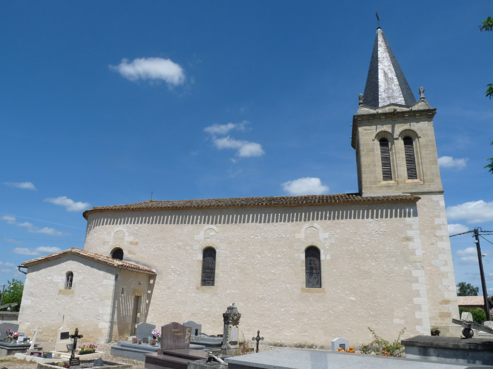 Eglise de St-Philippe-du-Seignal, Gironde, France